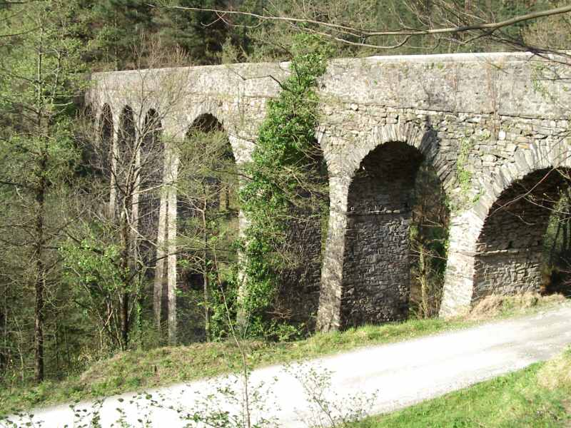 Acueducto de Ameraun, sobre el río Leitzaran